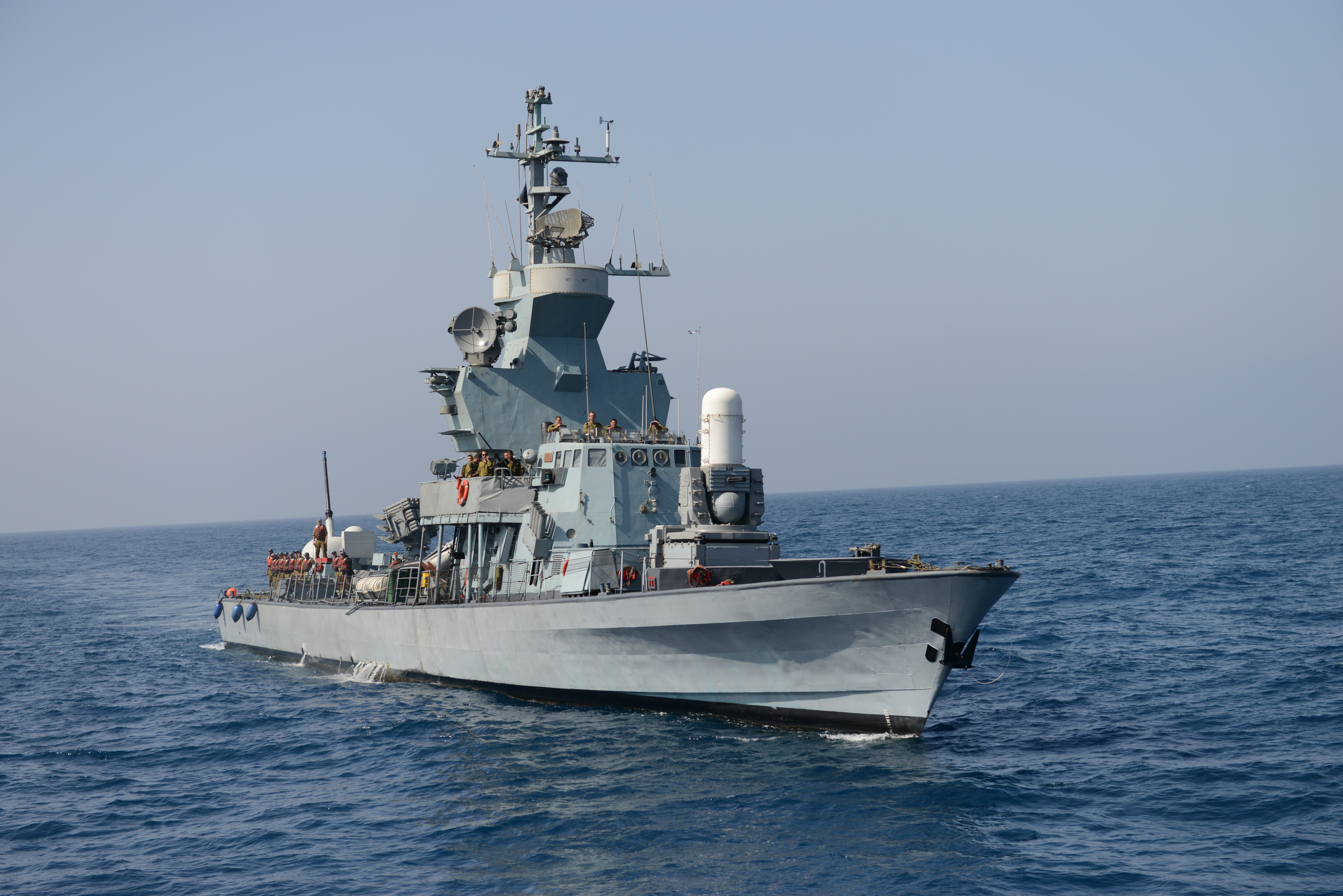 INS Kidon